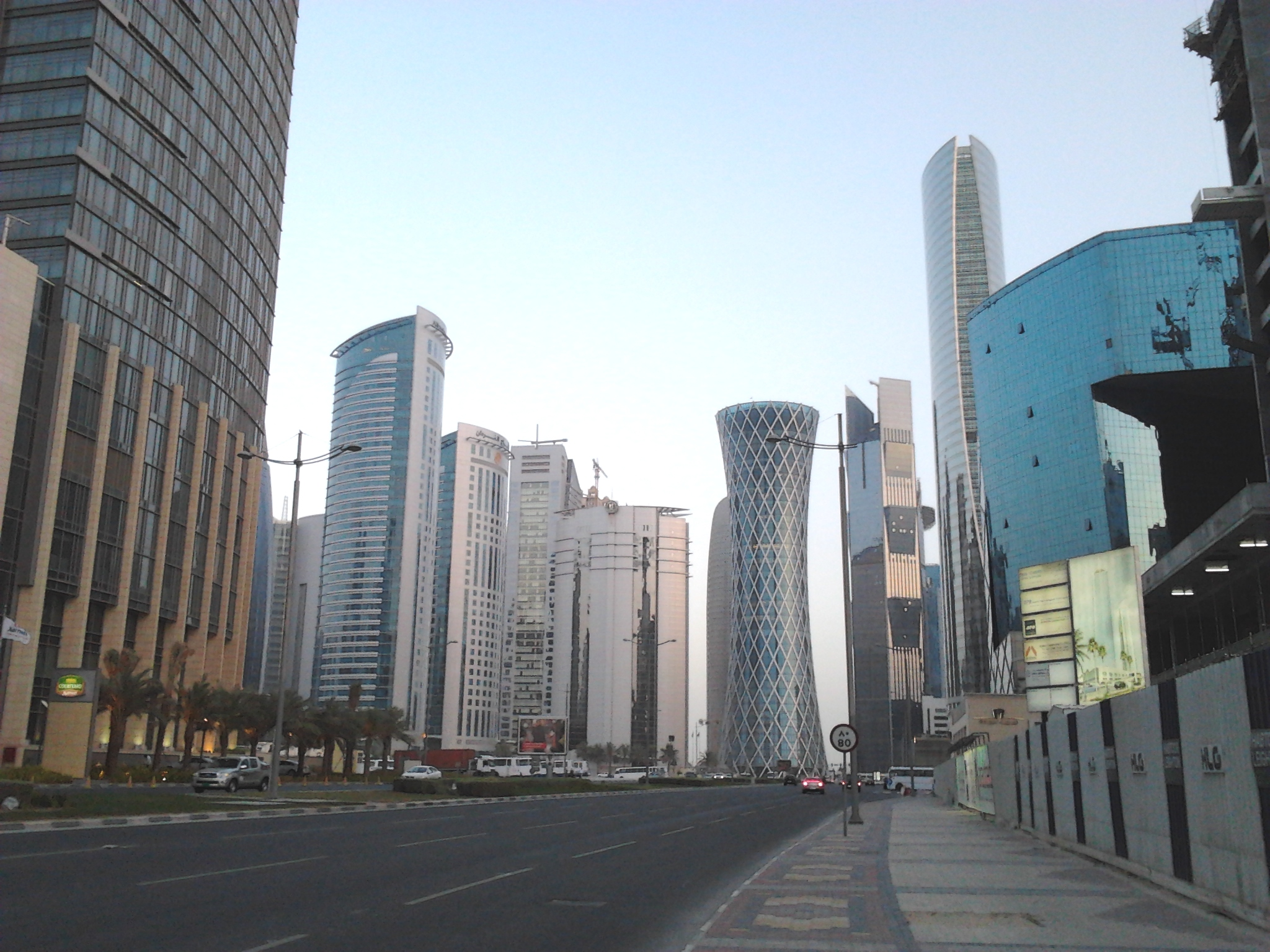 ドーハ中心部